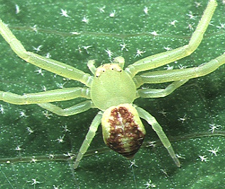 female Ebrechtella tricuspidata from Okinawa.